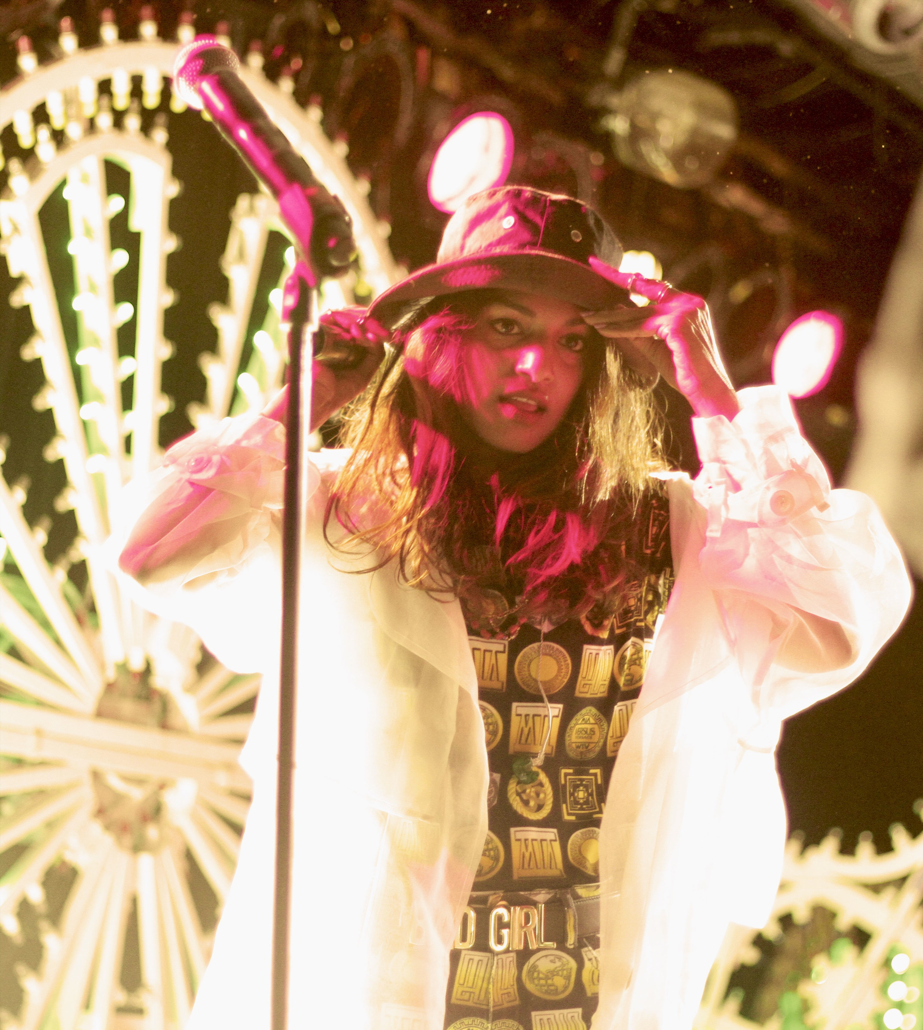 M.I.A. en una presentación en Toronto, Canadá, en mayo de 2014. Recorte de esta fotografía.